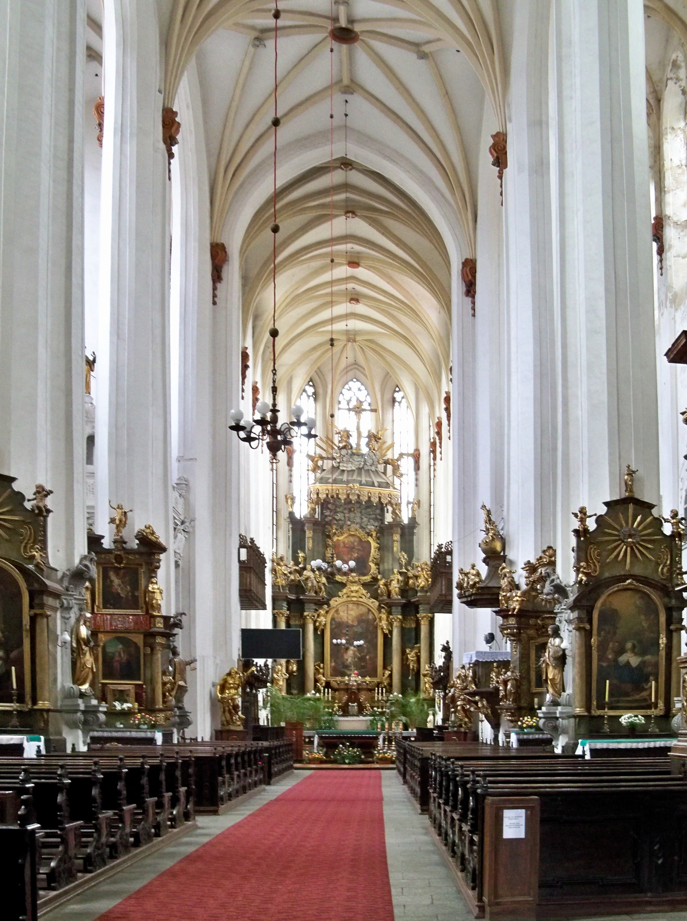 Kościół św. Stanisława, św. Doroty i św. Wacława we Wrocławiu